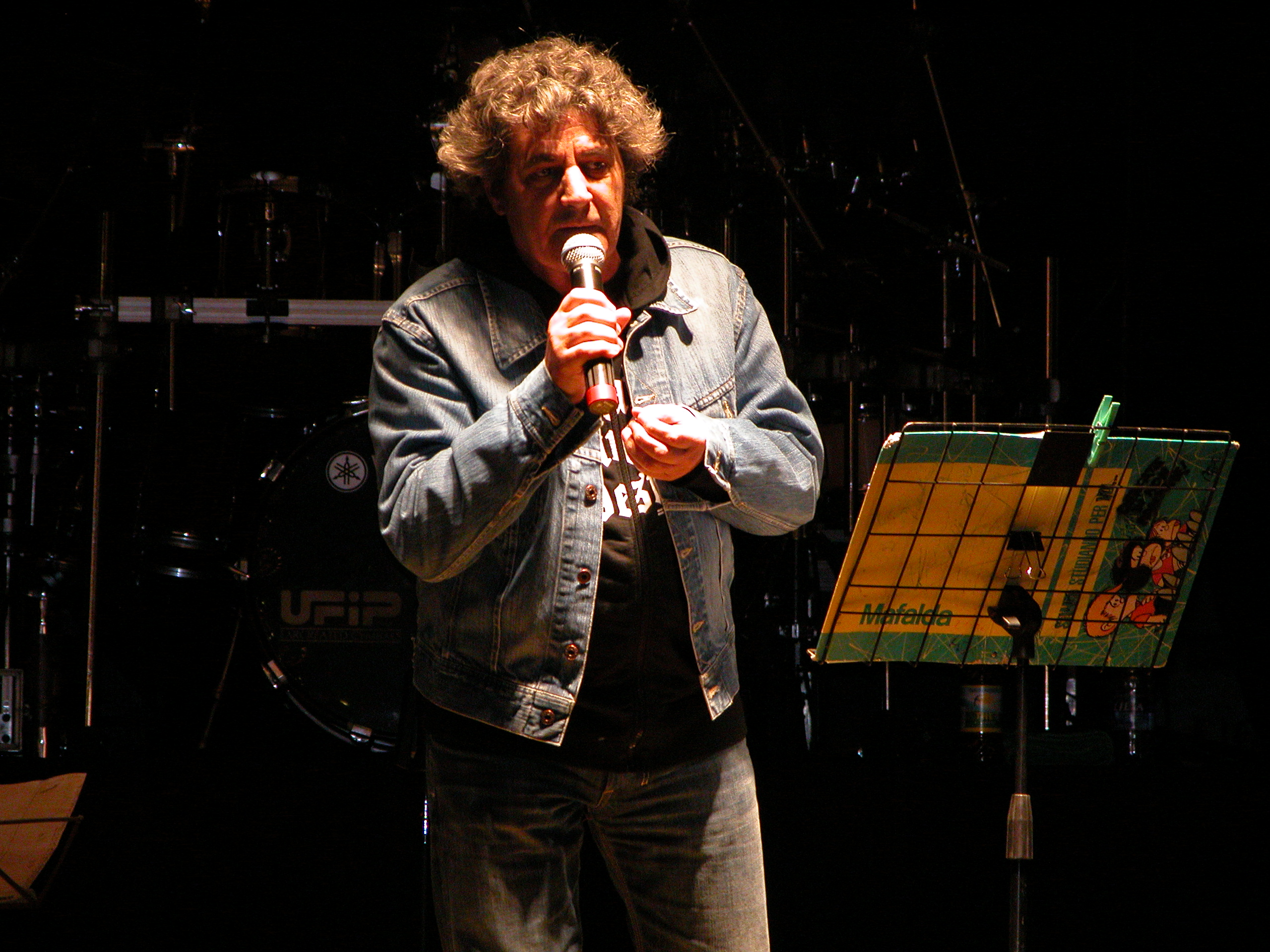 Fausto Leali in concerto per la Festa di S.Antonio da Padova